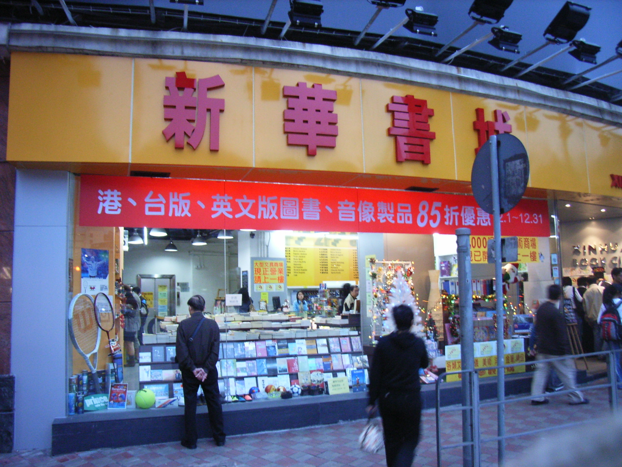 香港新華書城: 灣仔堅拿道26號